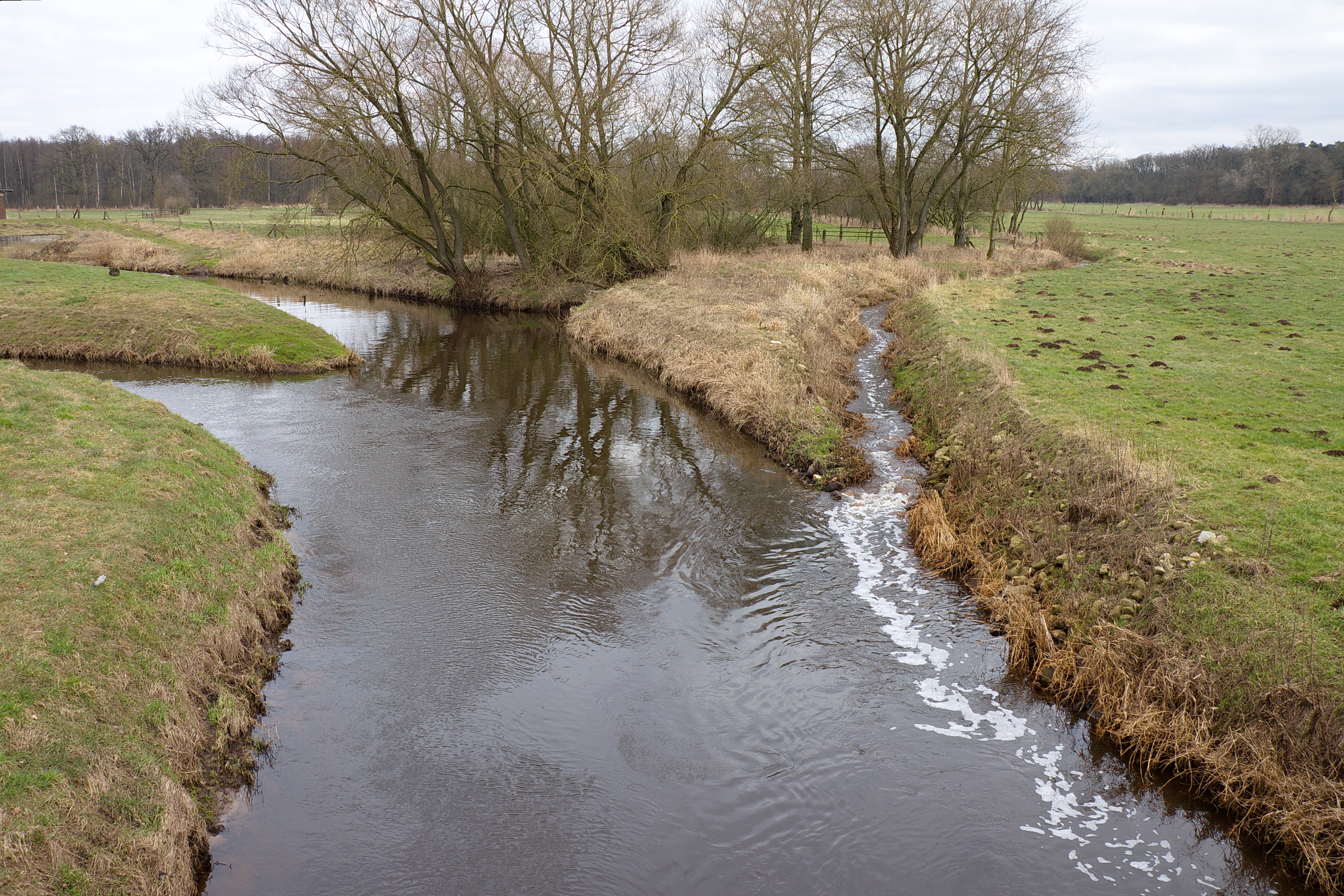 Der Fluss Böhme am Rittergut Böhme in Böhme, Niedersachsen, Deutschland